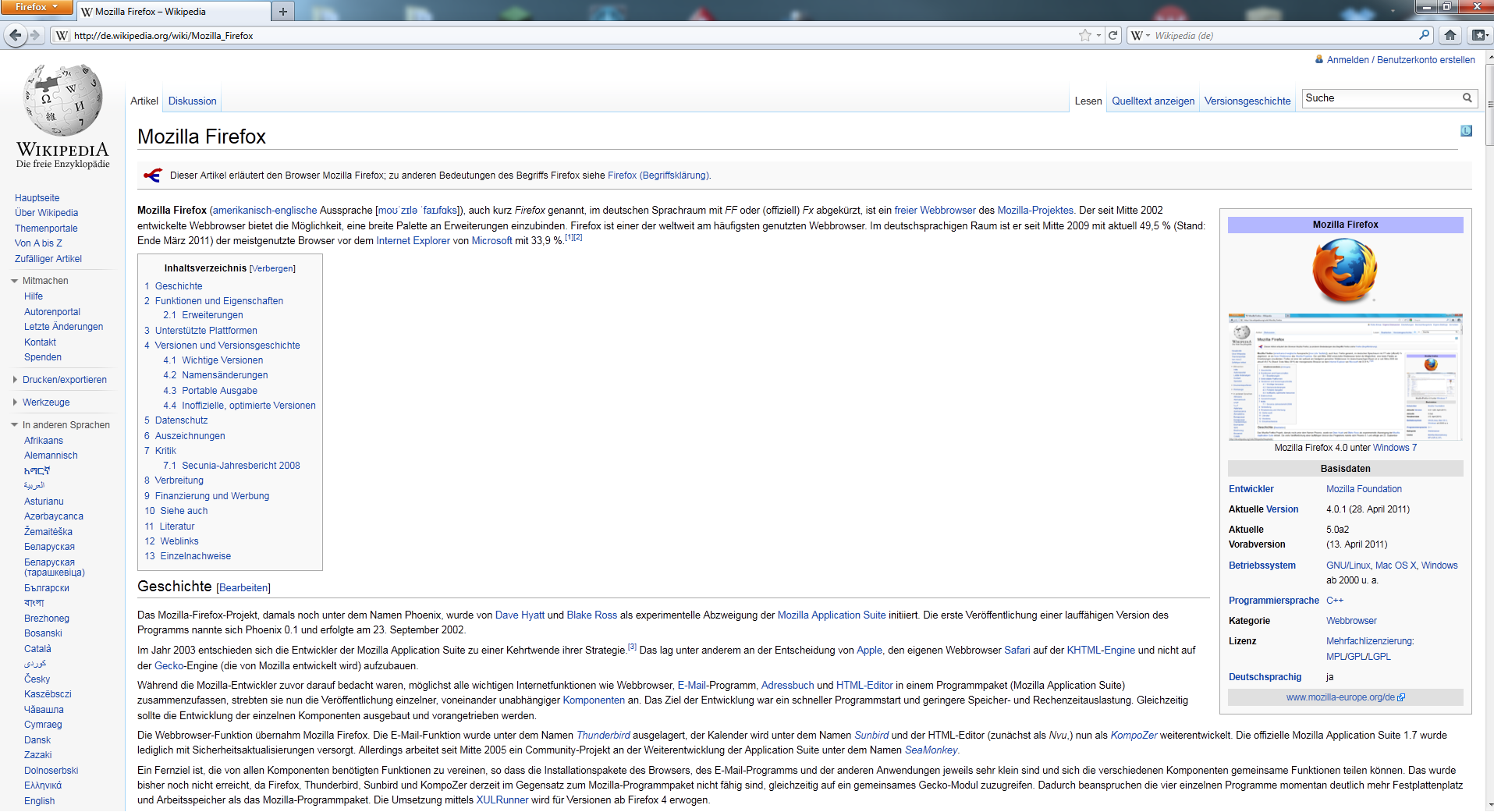 Firefox Screenshot